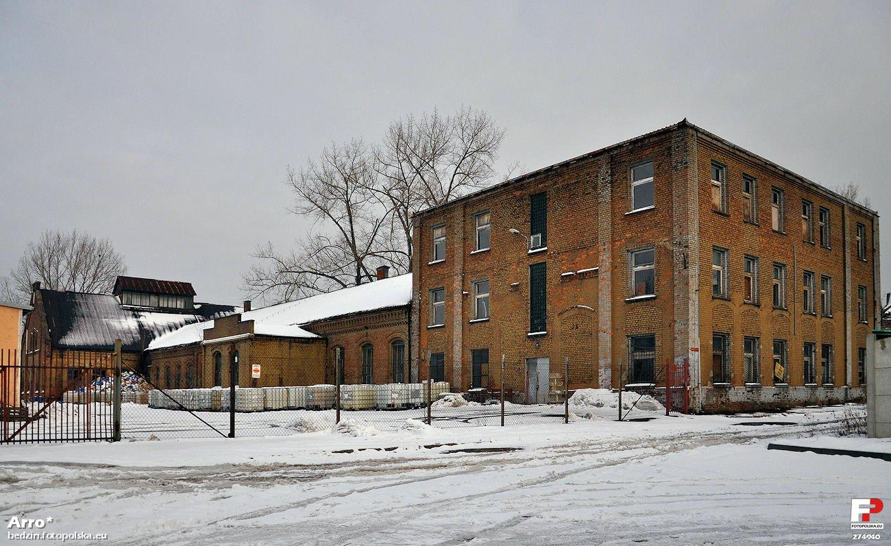 Zabudowania dawnej KWK Grodziec. Przeznaczenie tego budynku nie do końca jest mi znane. Wiem tylko, iż w lewej jego części mieściły się warsztaty mechaniczne.